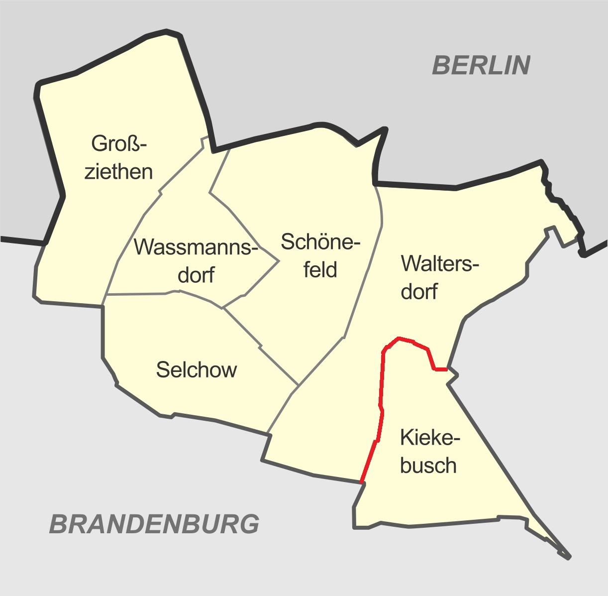 Gliederung der Gemeinde Schönefeld in Ortsteile, mit Heraushebung des Ortsteils Kiekebusch